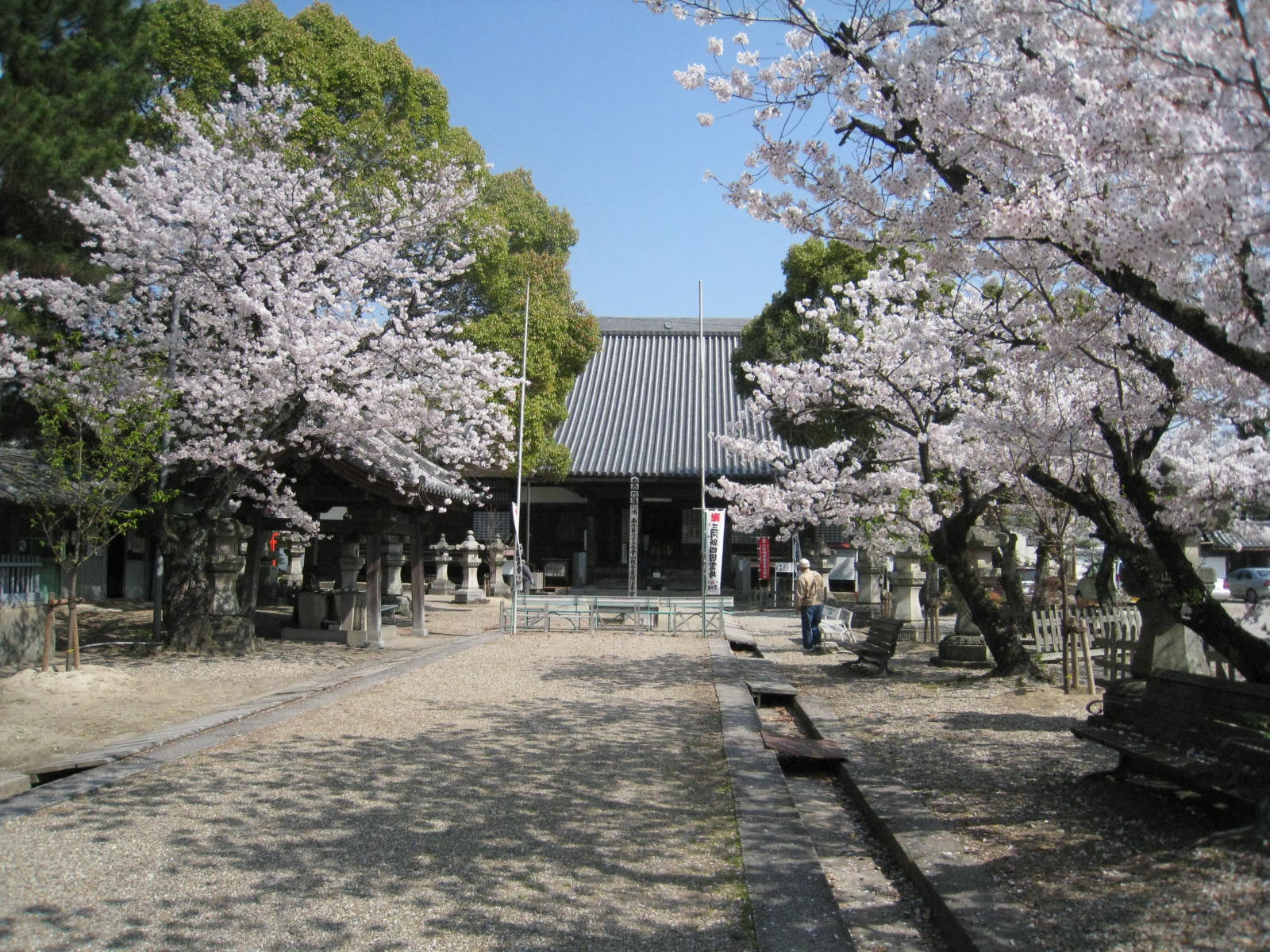 大樹寺（岡崎市鴨田町）